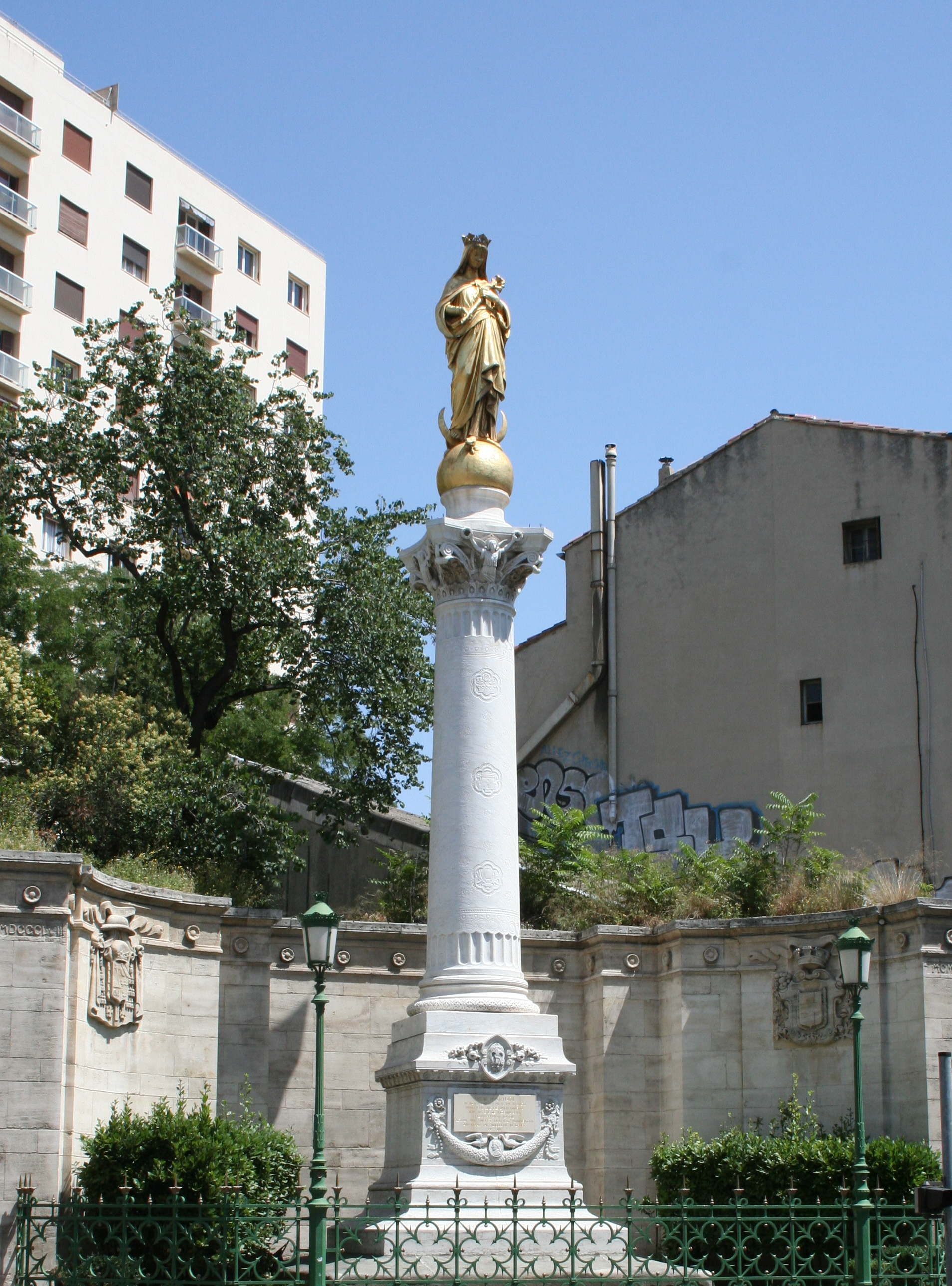 Monument de la Vierge érigée en 1857 en mémoire de l'immaculée conception, inauguré par Mgr. de Mazenod - Marseille (Bouches-du-Rhône